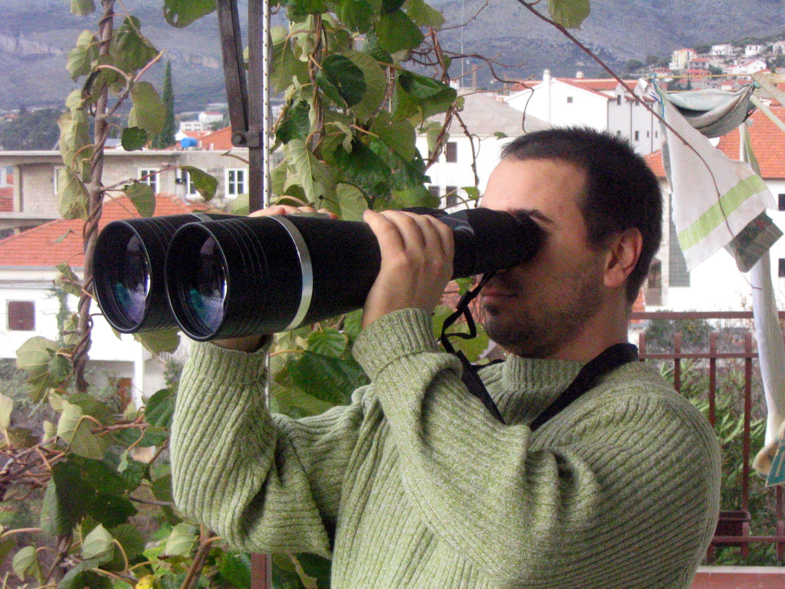 Binoculars, 25x100